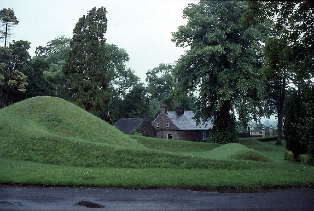 Battle Garden, Kilwarlin.